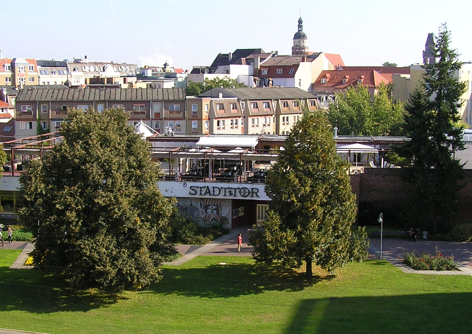 Stadtpromenade 8 (Gaststätte Stadttor Cottbus)